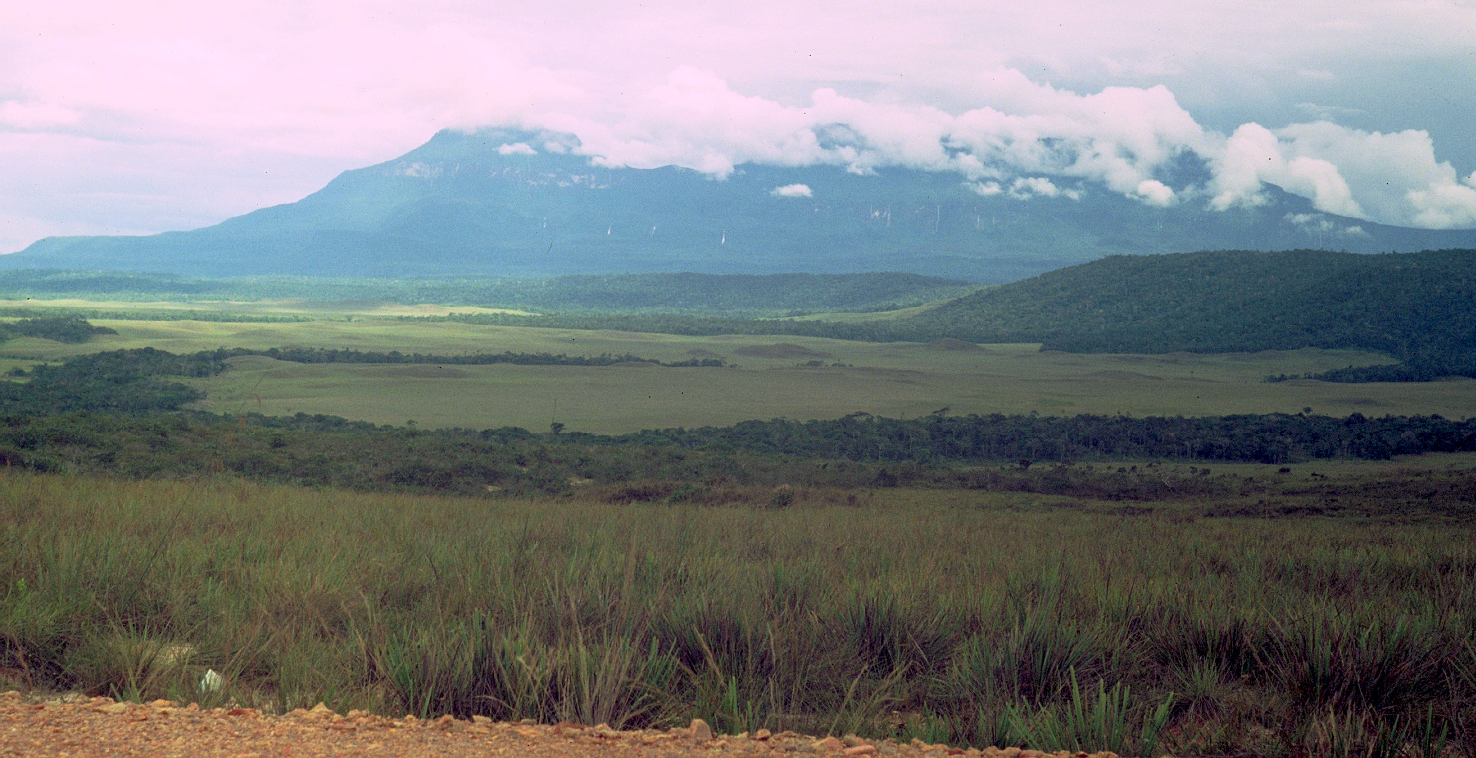 El Wei Tepuy en La Gran Sabana, Estado Bolívar, Venezuela